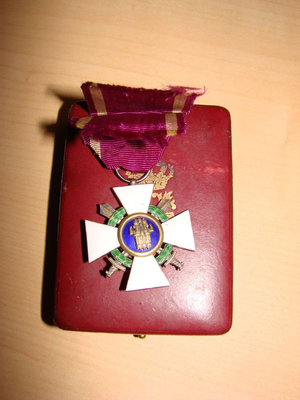 Rückseite des Ordens vom römischen Adler mit Schwertern